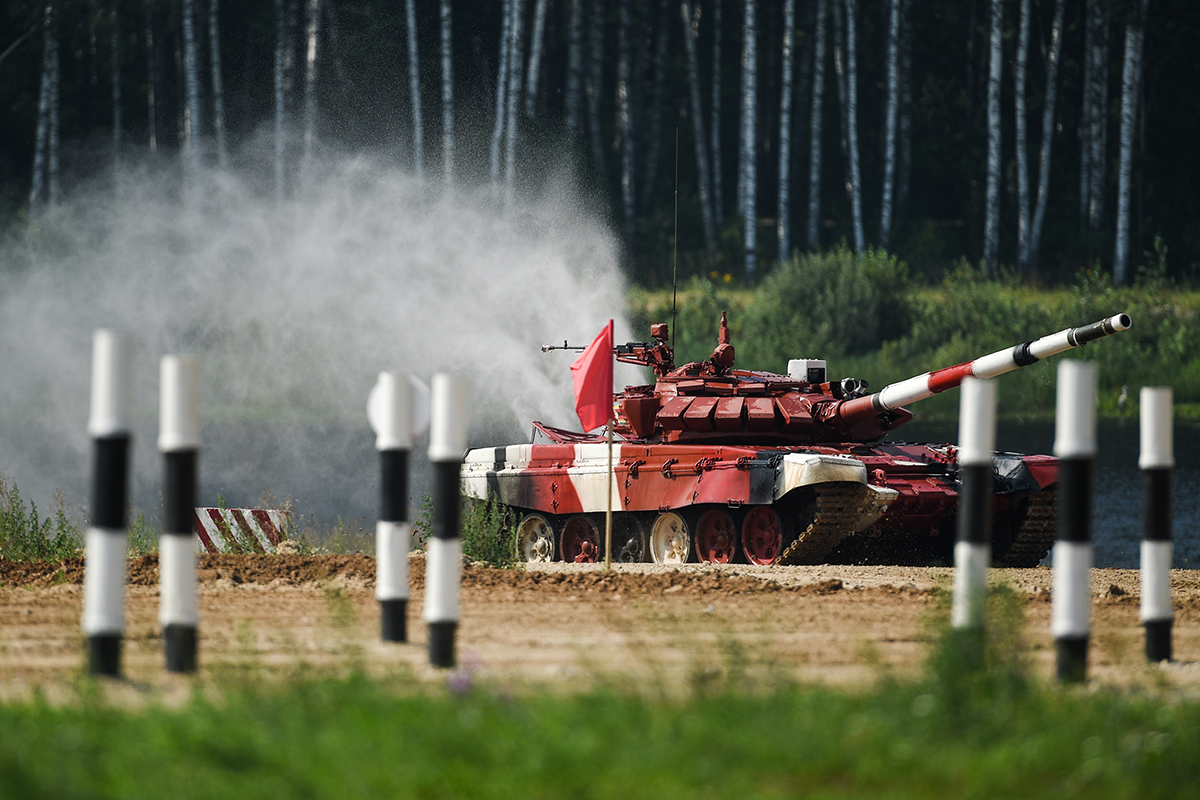 Т-72Б3 обр. 2011. Первые заезды конкурса «Танковый биатлон».